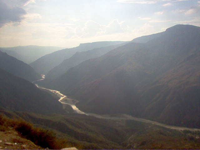 Cañon del Chicamocha, Santander, Colombia.